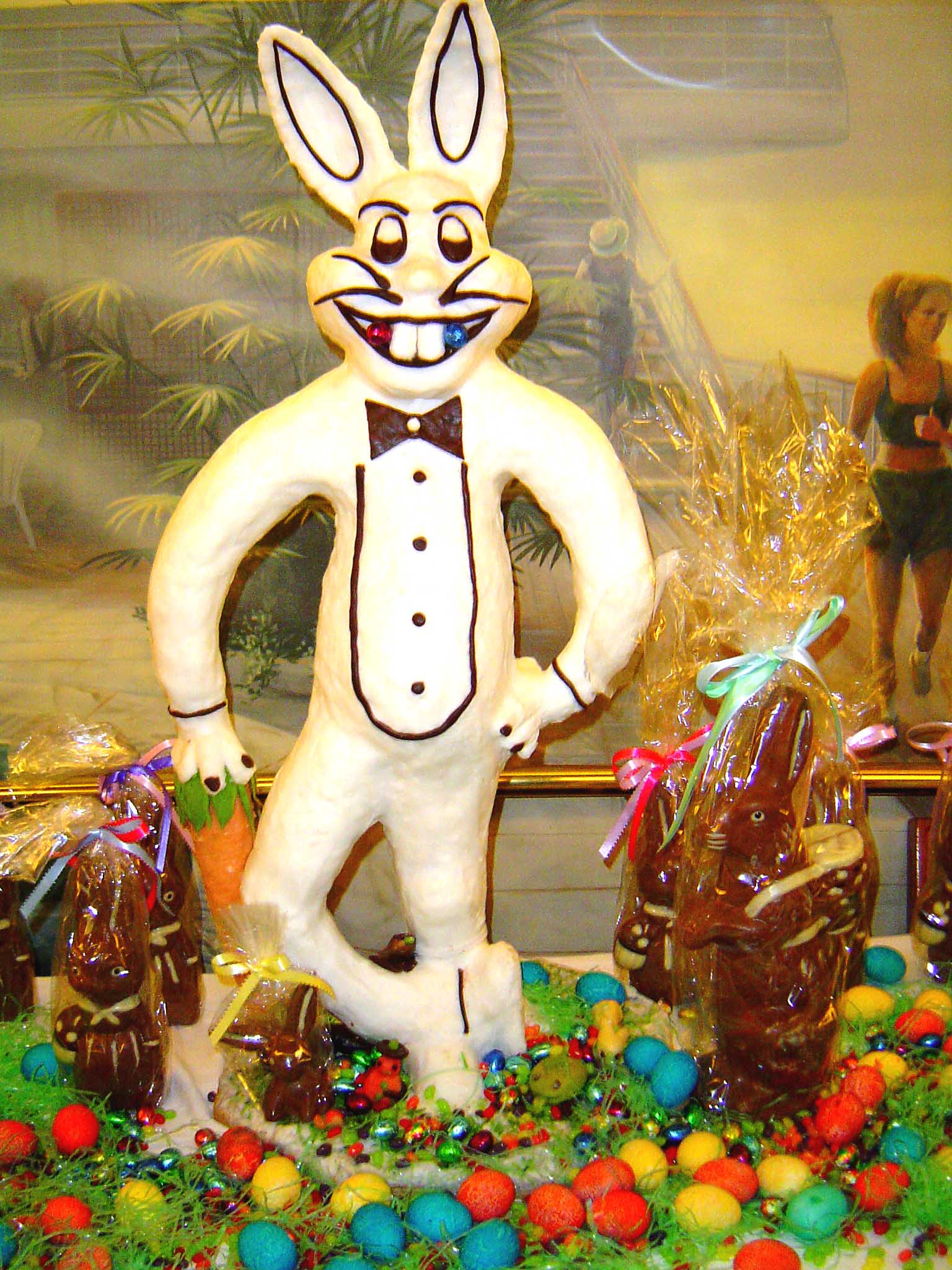 Oueschterhues